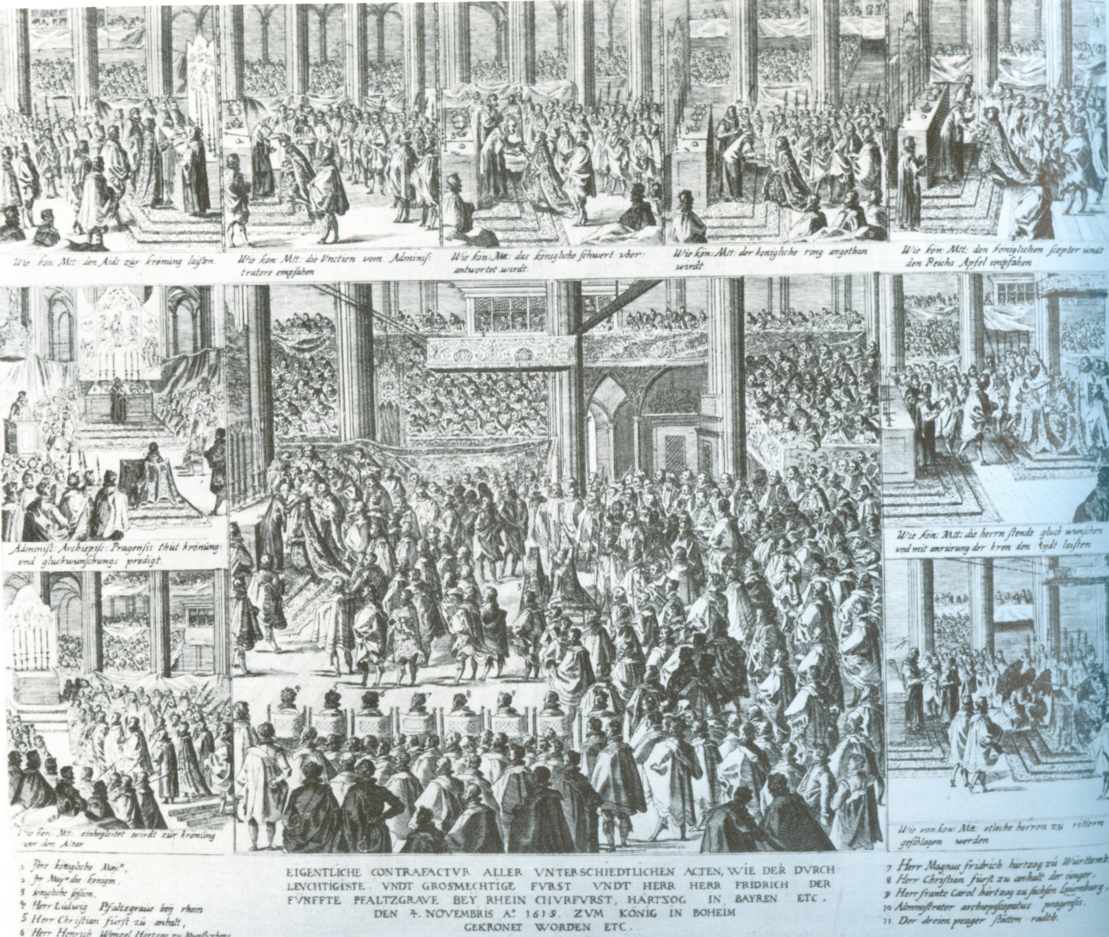 Krönung Friedrichs V. von der Pfalz zum böhmischen König Kupferstich eingescannt aus: Die Renaissance im deutschen Südwesten zwischen Reformation und Dreißigjährigem Krieg. Eine Ausstellung des Landes Baden-Württemberg, Heidelberger Schloss, 21. Juni - 19 Oktober 1986